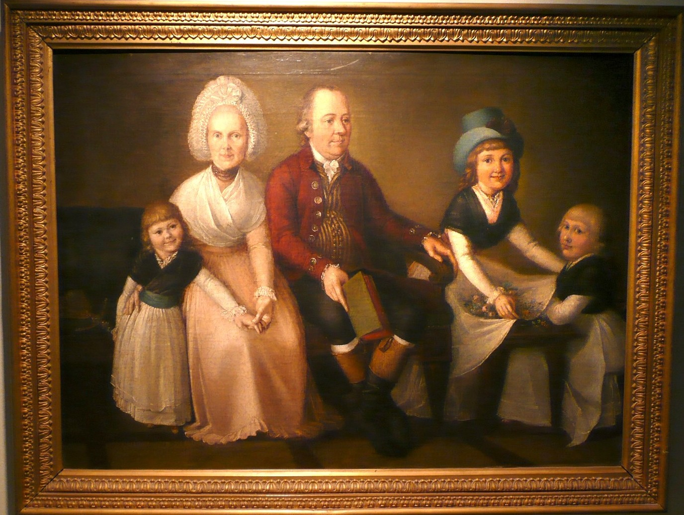 Familienporträt von Tübinger Buchdruckermeister Wilhelm Heinrich Schramm, 1758–1823 (Ölgemälde). Besitz der Familie Mohr de Sylva, Tübingen. Eine farbige Reproduktion befindet sich im Hermann-Kurz-Museum in Reutlingen.